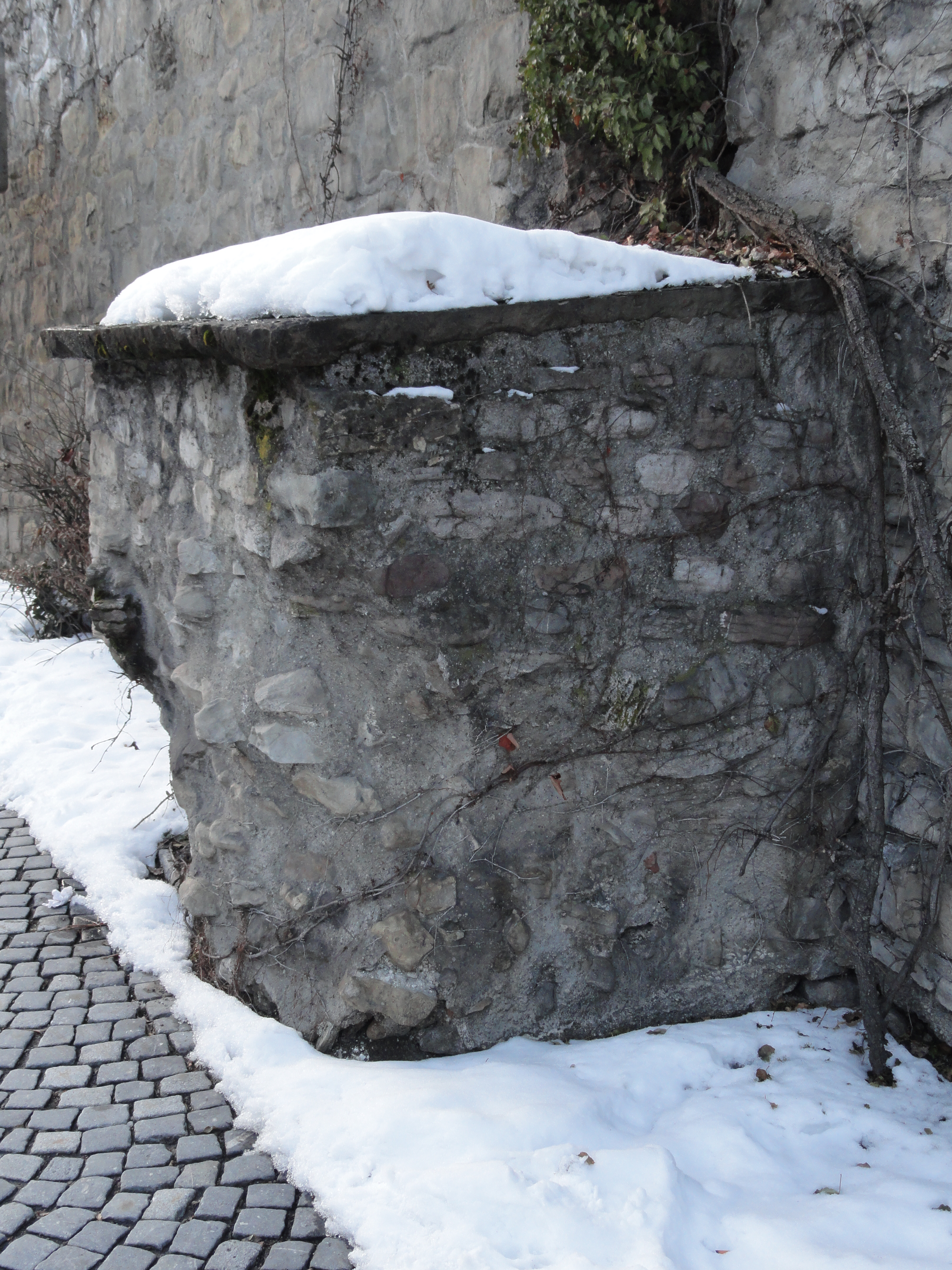 Teil der spätrömischen Stadtmauer in Kempten - unter der Burghalde gelegen